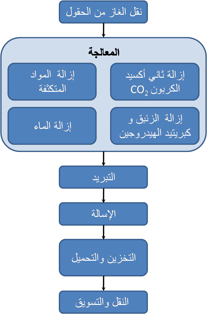 شكل مبسط يوضح عمليات معالجة الغاز الطبيعي المسال. هناك تحديث بسيط للنسخ السابقة في الموقع العربي بتعديل أكسيد الكبريت إلى كبريتيد الهيدروجين لأنه الأصح